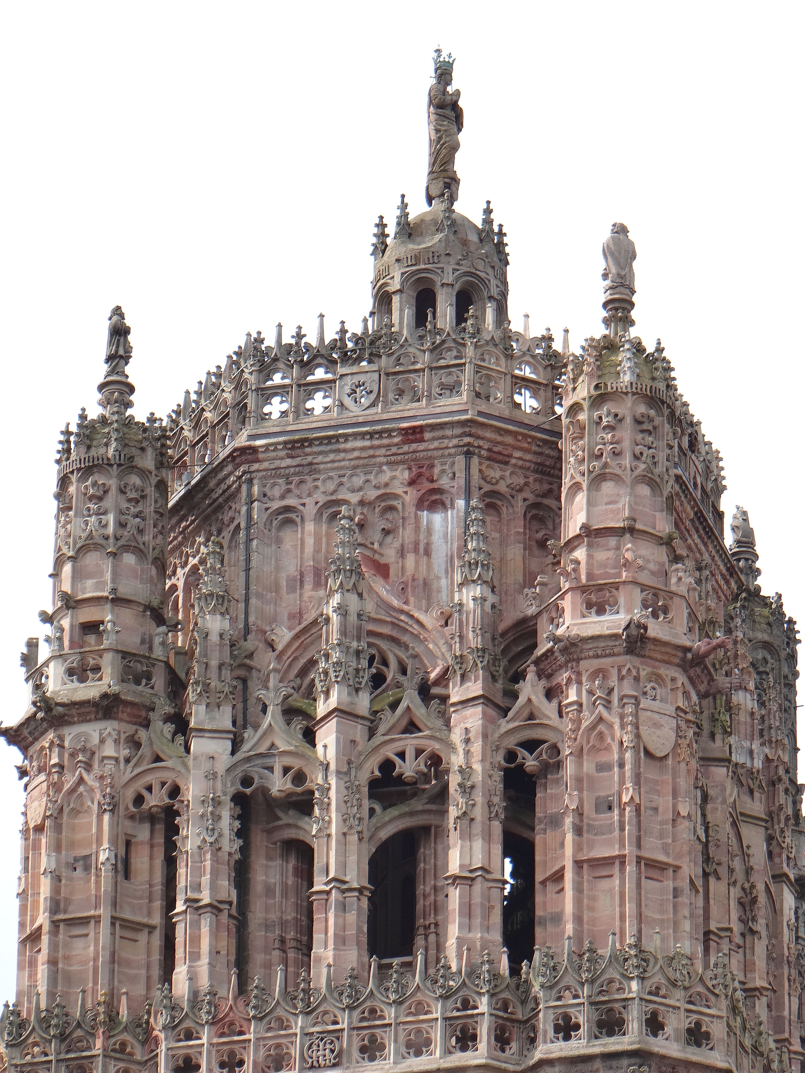 Rodez - Cathédrale Notre-Dame - Clocher